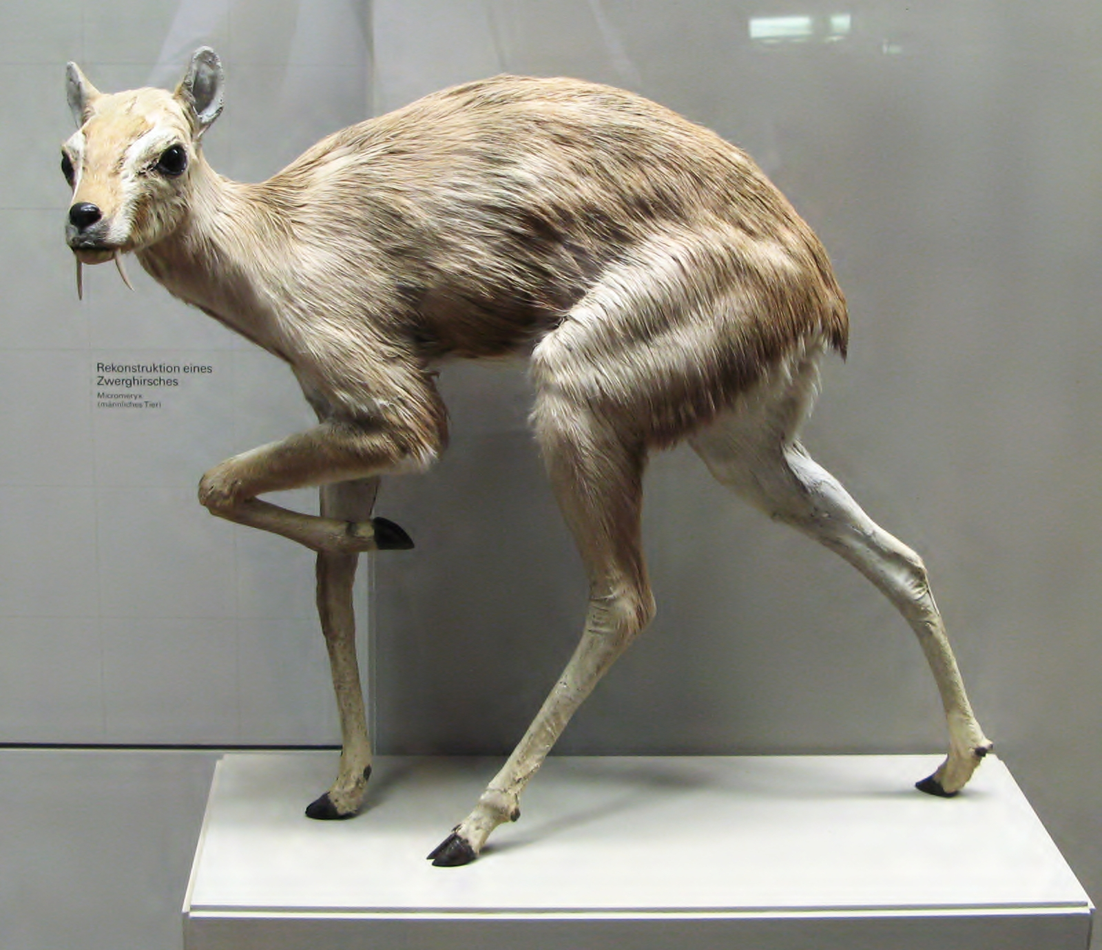 Zwerghirsch (Micromeryx), männliches Exemplar, Rekonstruktion - aufgenommen im Museum am Löwentor, Stuttgart